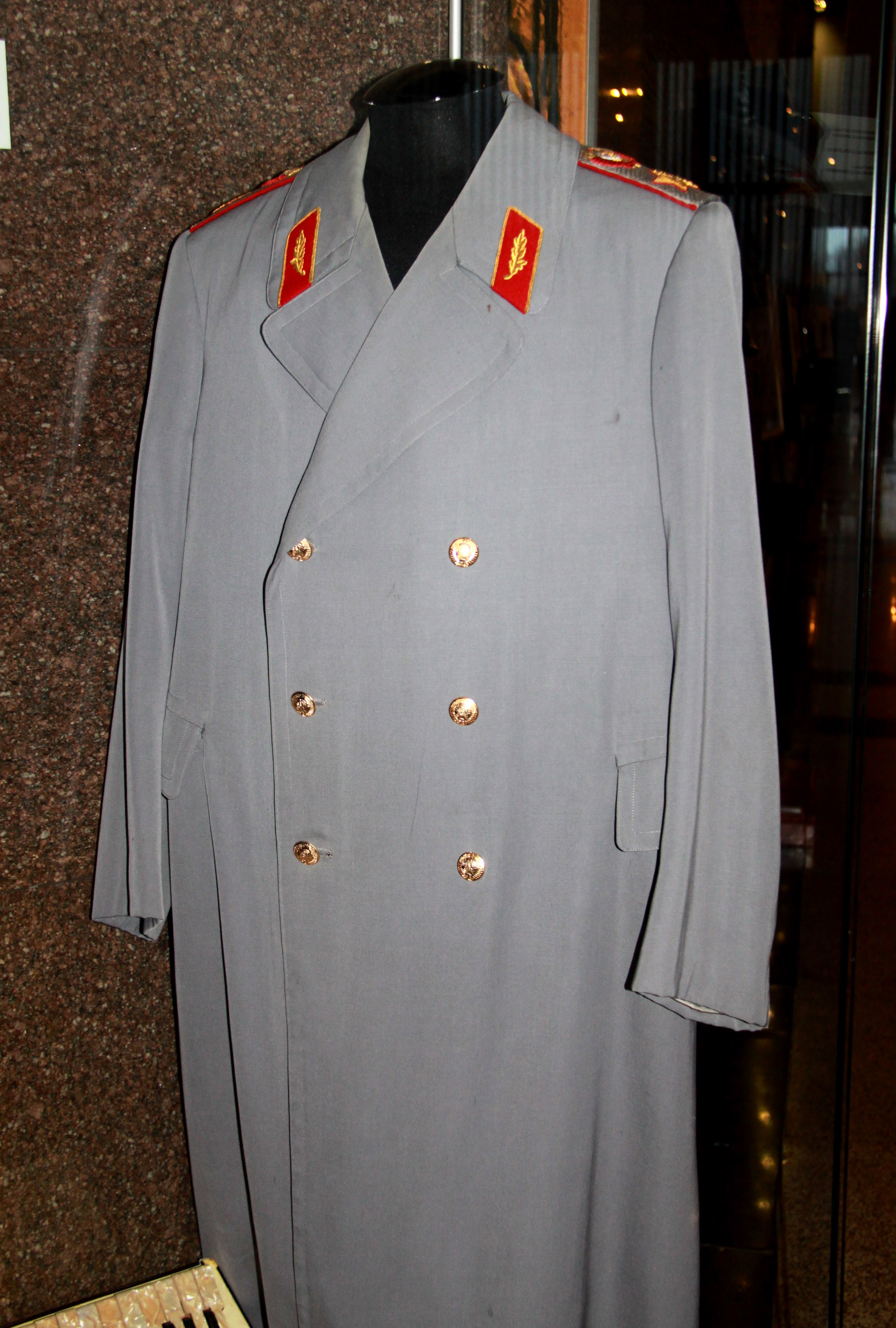 Летнее пальто образца 1943 года Маршала Советского Союза В. Д. Соколовского